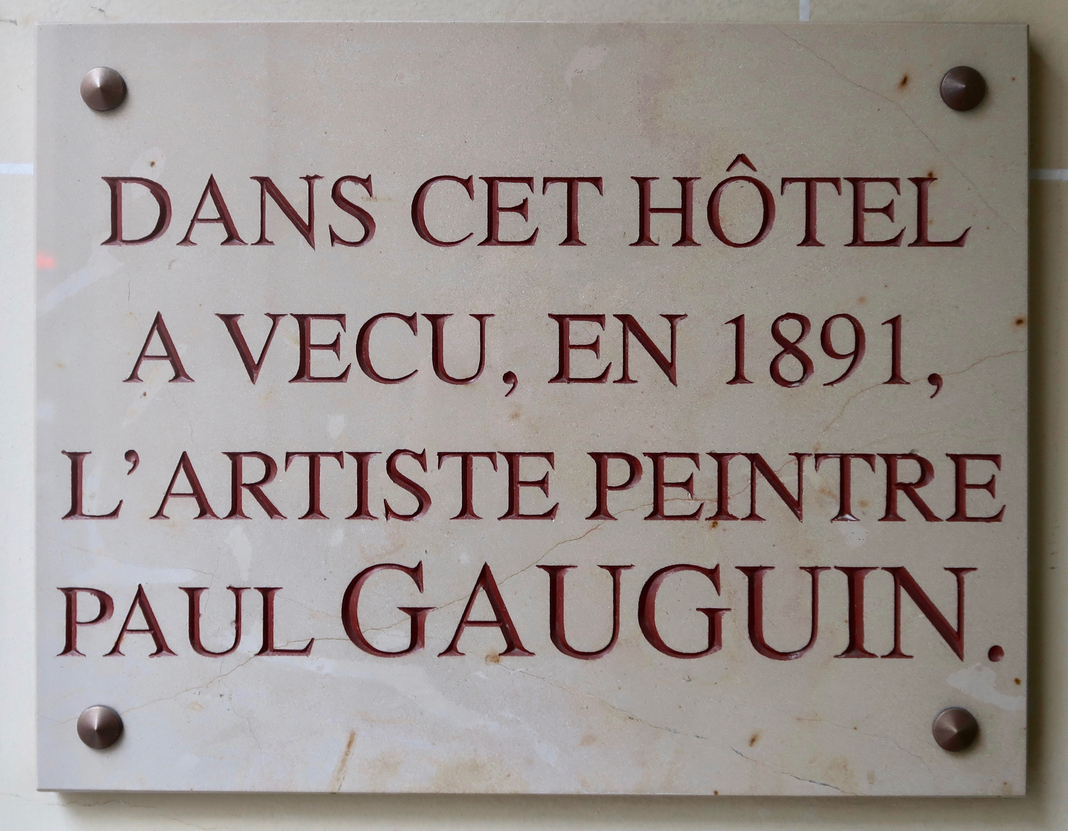 Plaque en hommage à Paul Gauguin, 35 rue Delambre (Paris, 14e).